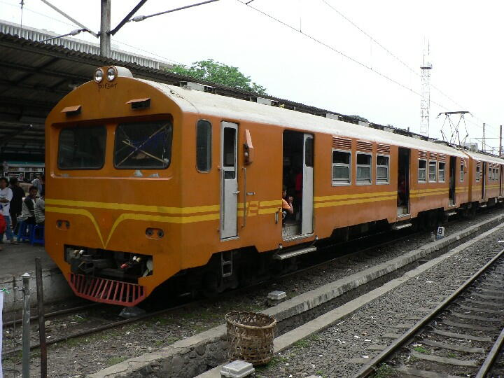 KRL Ekonomi di stasiun Kota. Gambar diambil pada 17/10/2006.